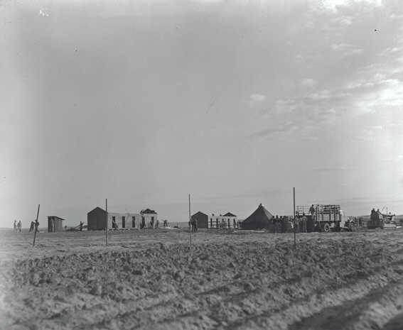 "חלוצה" - ישוב חדש בנגב- כבר בבוקר הנקודה על תילה עומדת.